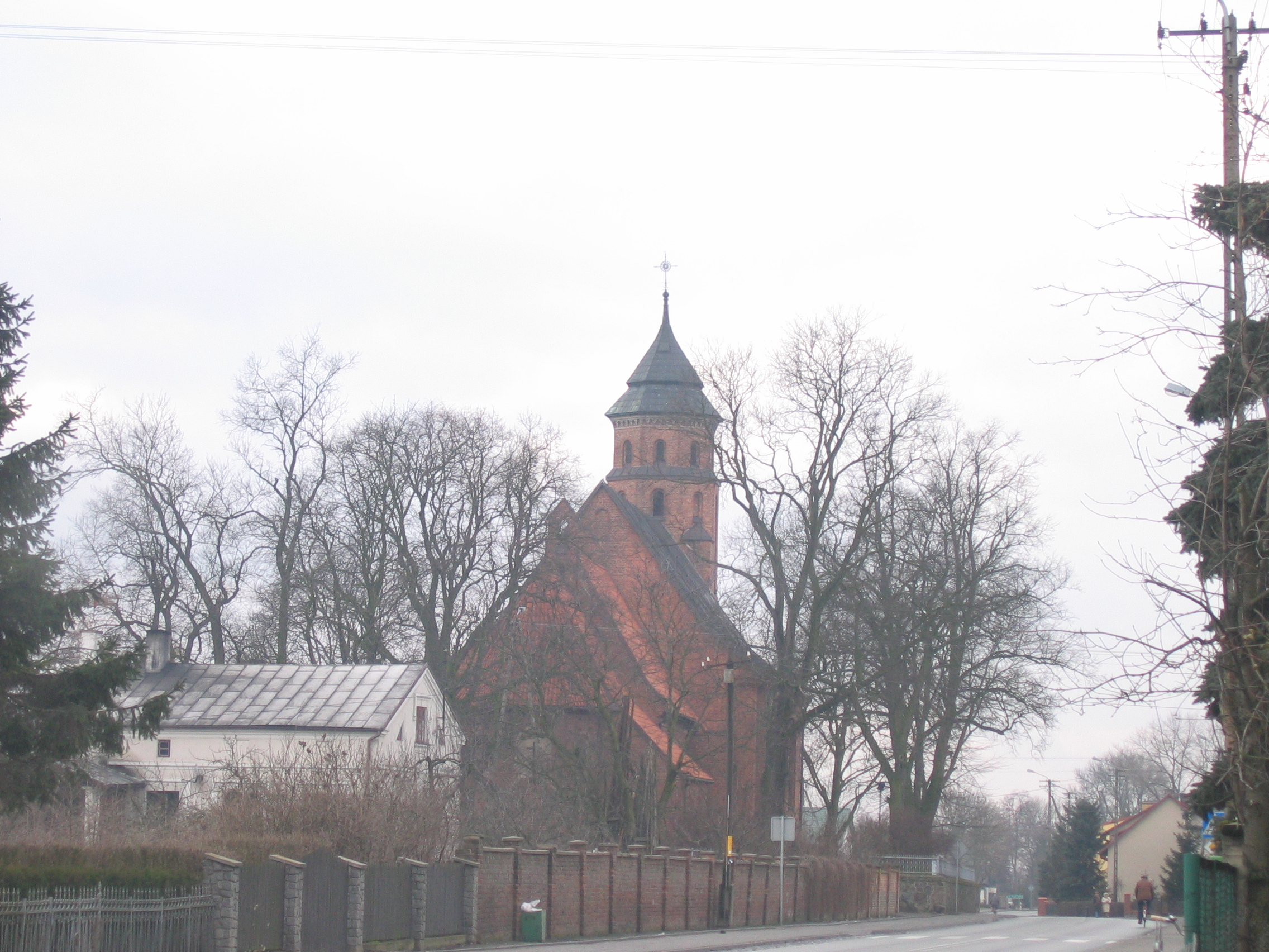 Bądkowo, ul. Włocławska 49 - rzymskokatolicki kościół parafialny p.w. św. Mateusza, 1312, 1917-1920